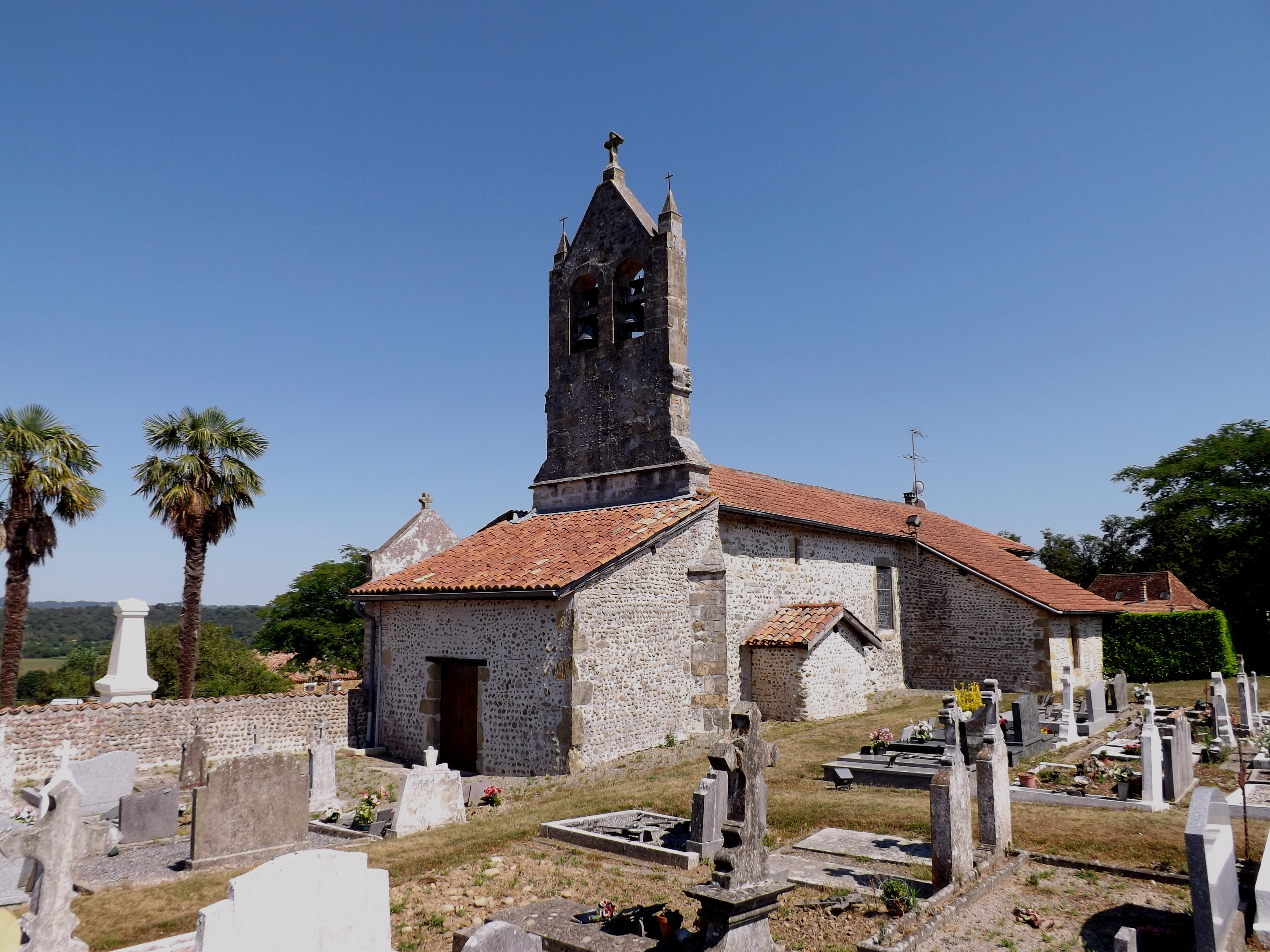 Glèisa de sent Miquèu de la Cau Junta, Tursan, Gasconha